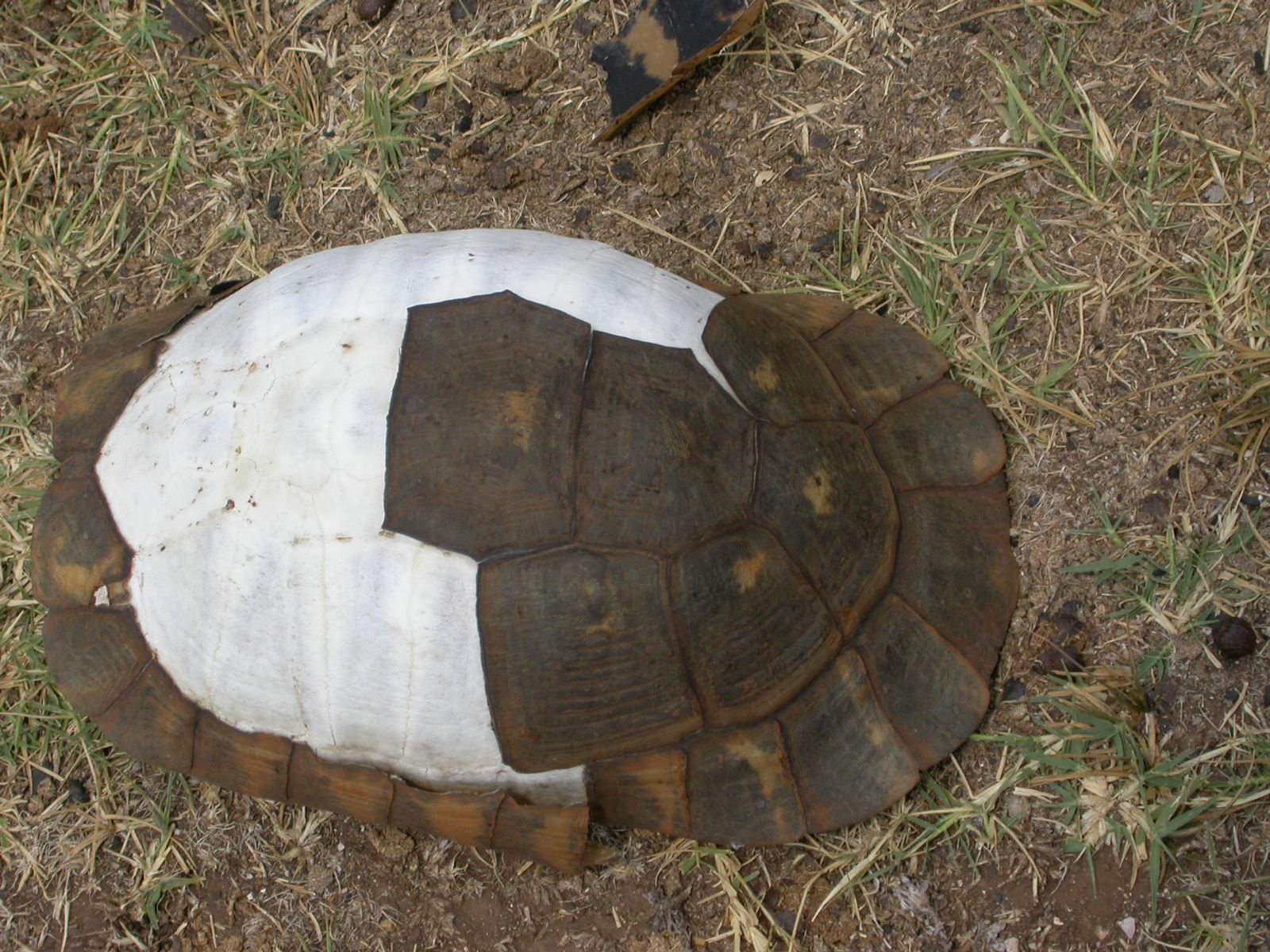 Carapace_di_Testudo_marginata,_femmina,_Lefkada,_agosto_2003.